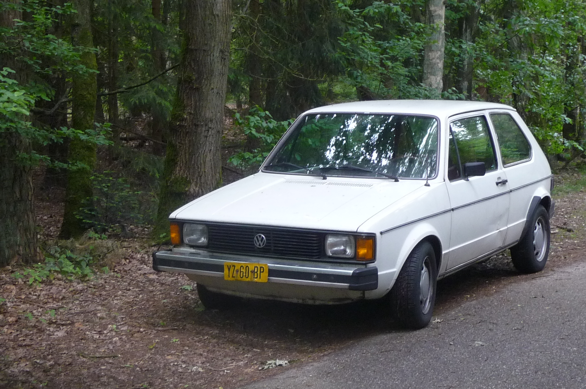 YZ-60-BP